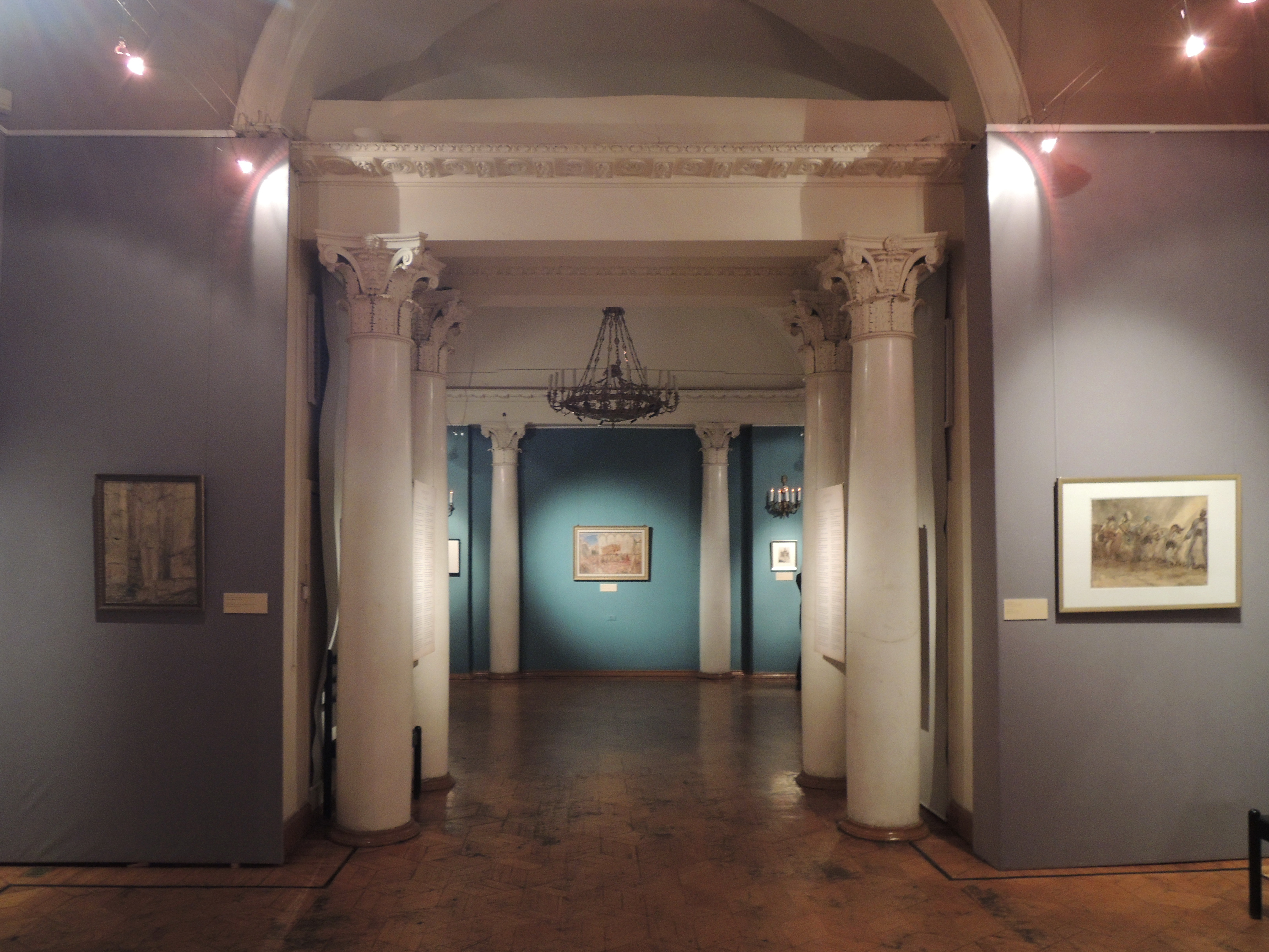 Государственный музей Востока (Москва)